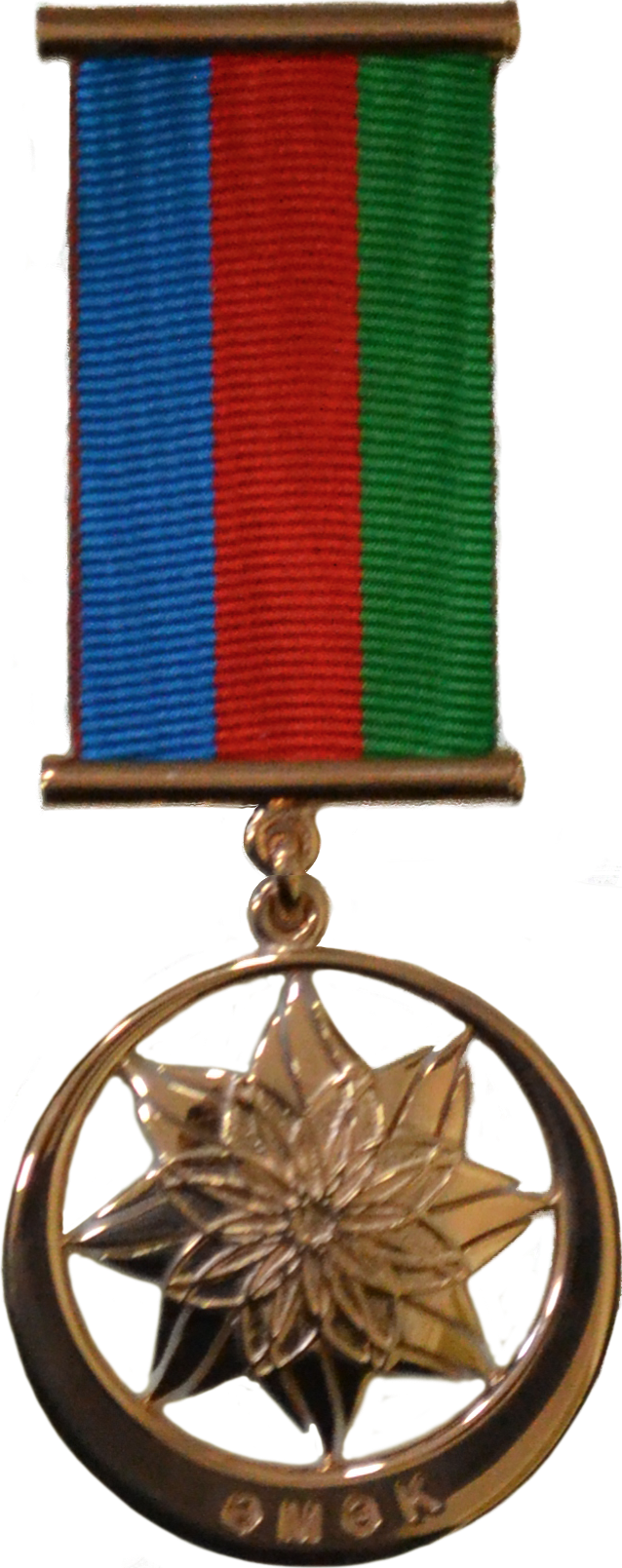 III dərəcəli "Əmək" ordeni